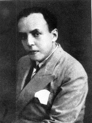 Ricardo Peña Barrenechea (1896-1939) poeta y dramaturgo peruano.